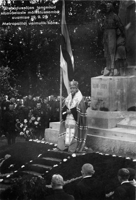 Viljandi, Vabadussõjas langenud sõjaväelaste mälestussamba avamine